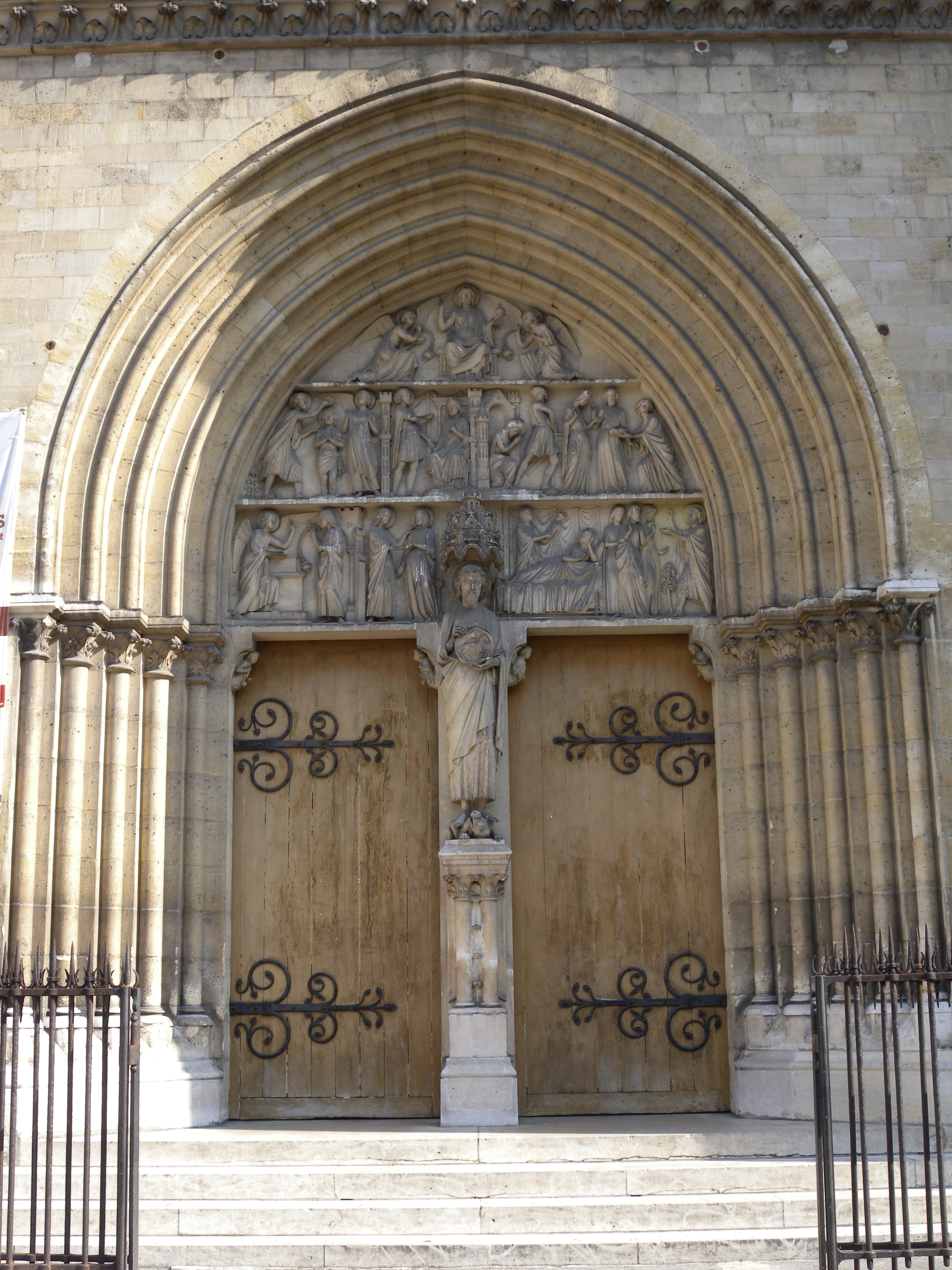 Portail de l'église Saint-Jean-Baptiste de Belleville à Paris. Ferrures de Pierre Boulanger (1813-1891) ferronnier d'art.